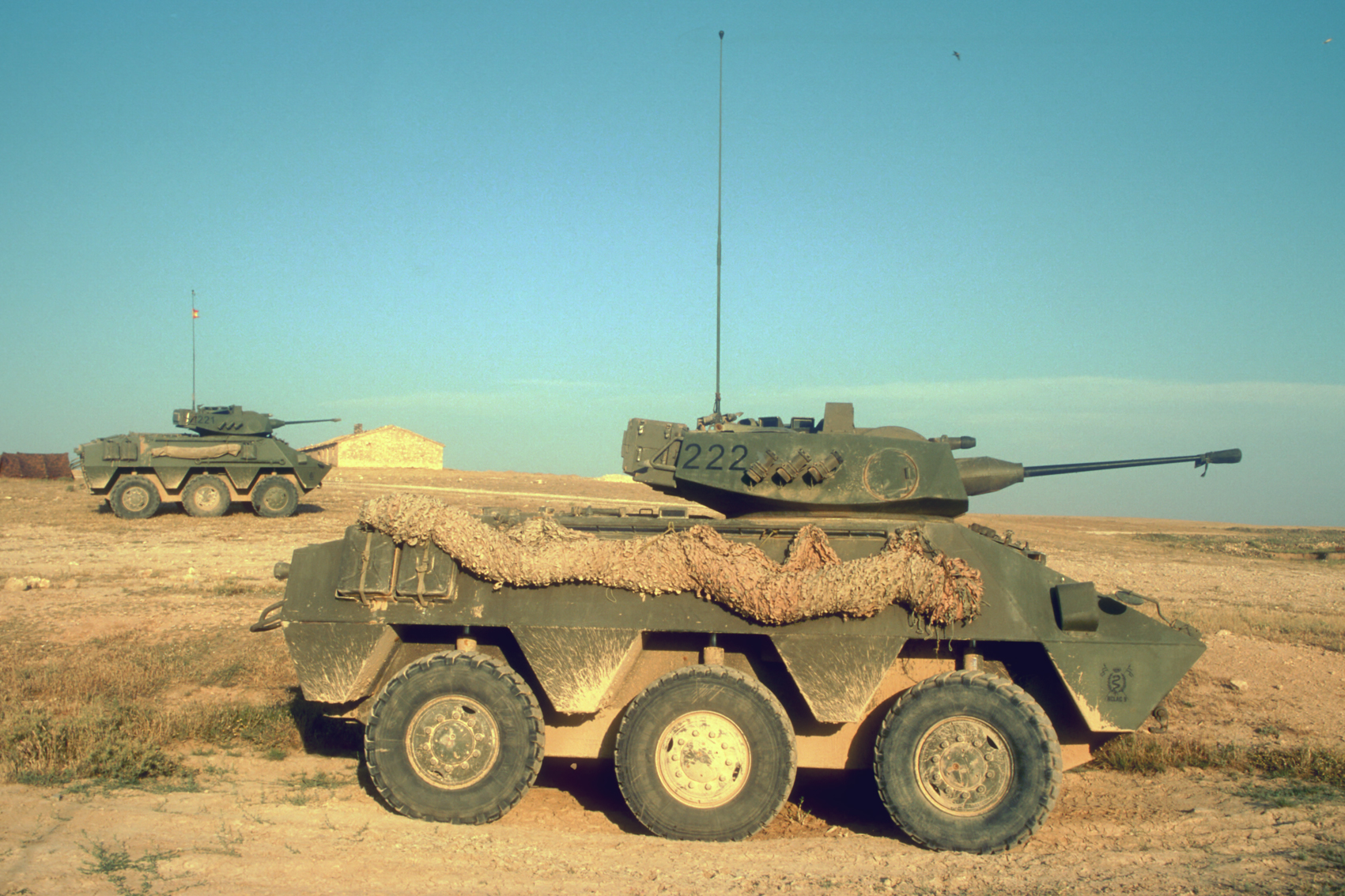 Santa Bárbara Sistemas VEC (Vehículo de Exploración de Caballería)